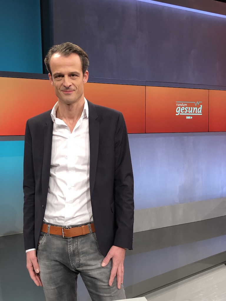 SWR Gesundheitsmagazin „rundum gesund“ 2019